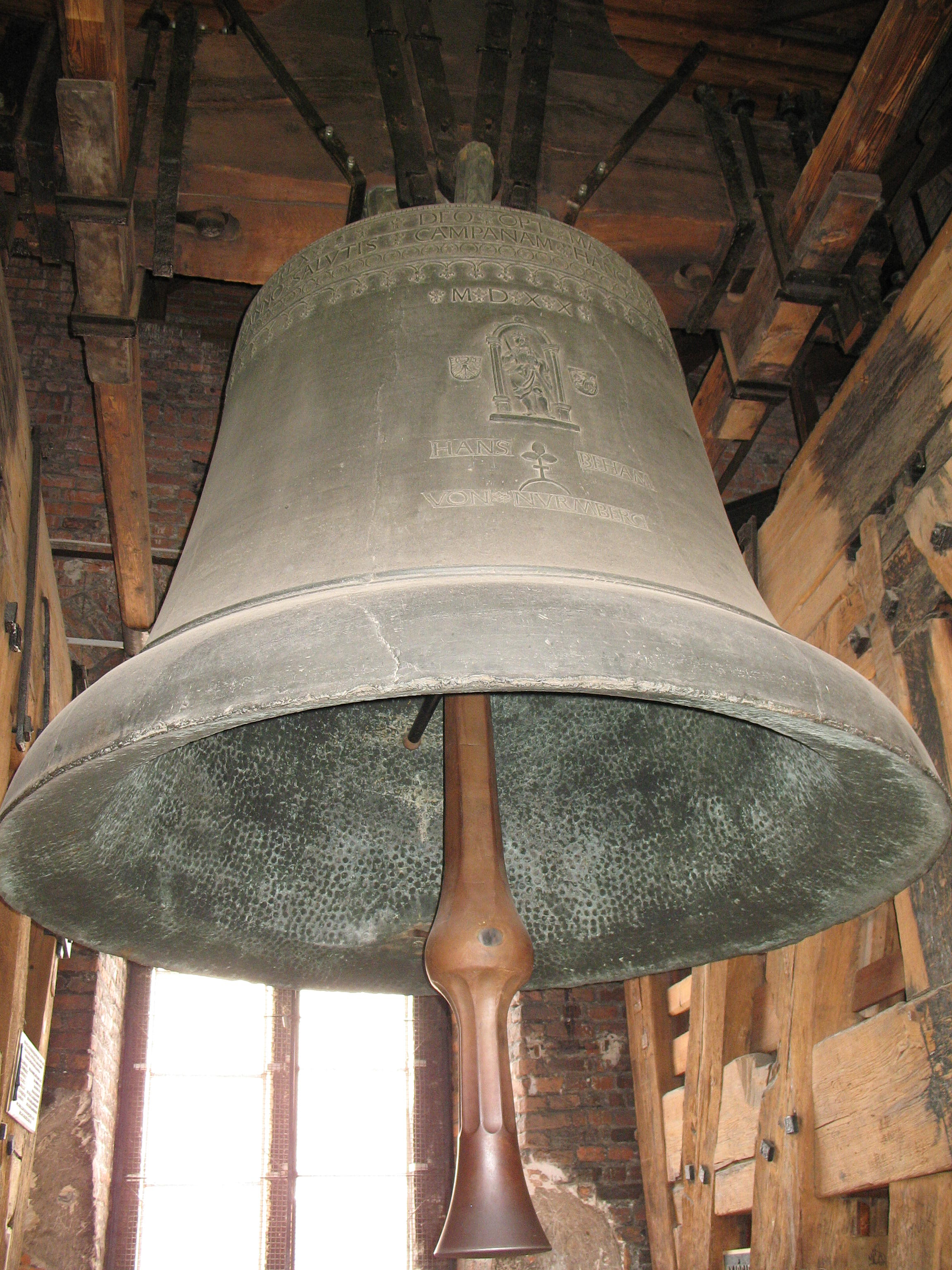 Wawel in Kraków, Poland